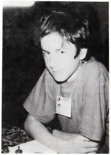 Bartłomiej Macieja podczas MŚ do 14 lat, Warszawa 1-13 lipca 1991.